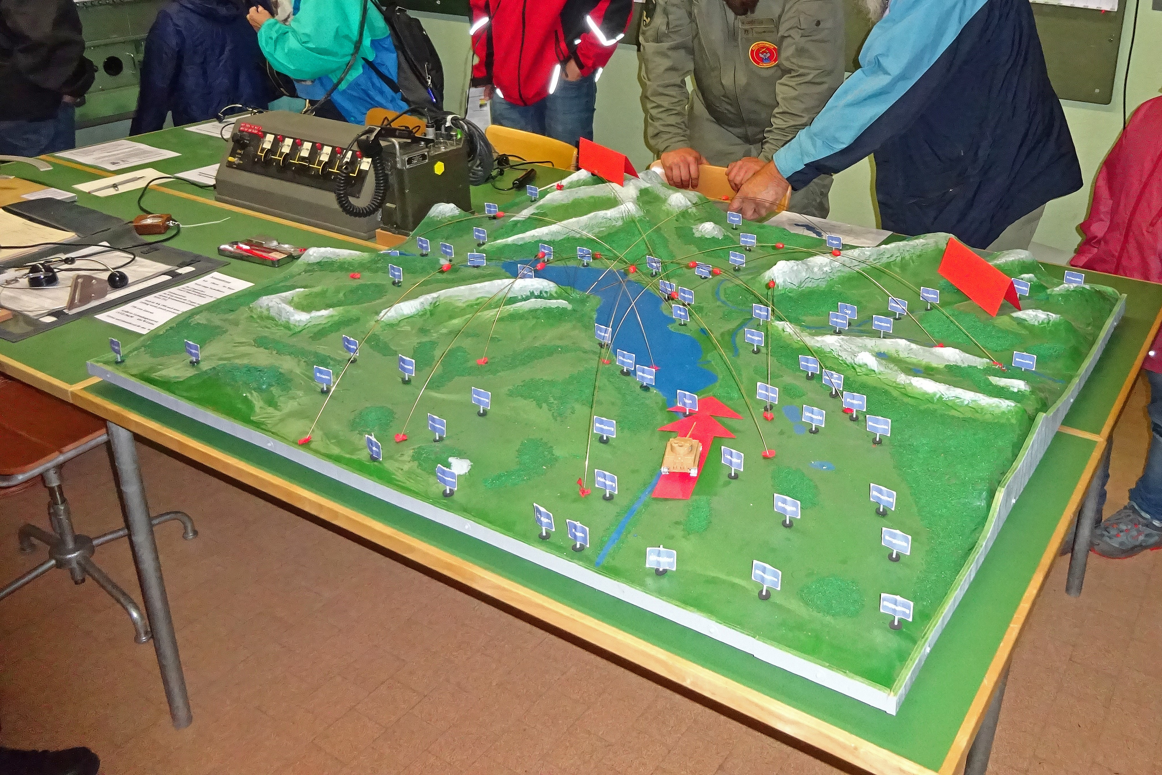 Kommandoposten Heinrich, Hondrich BE, Schweiz